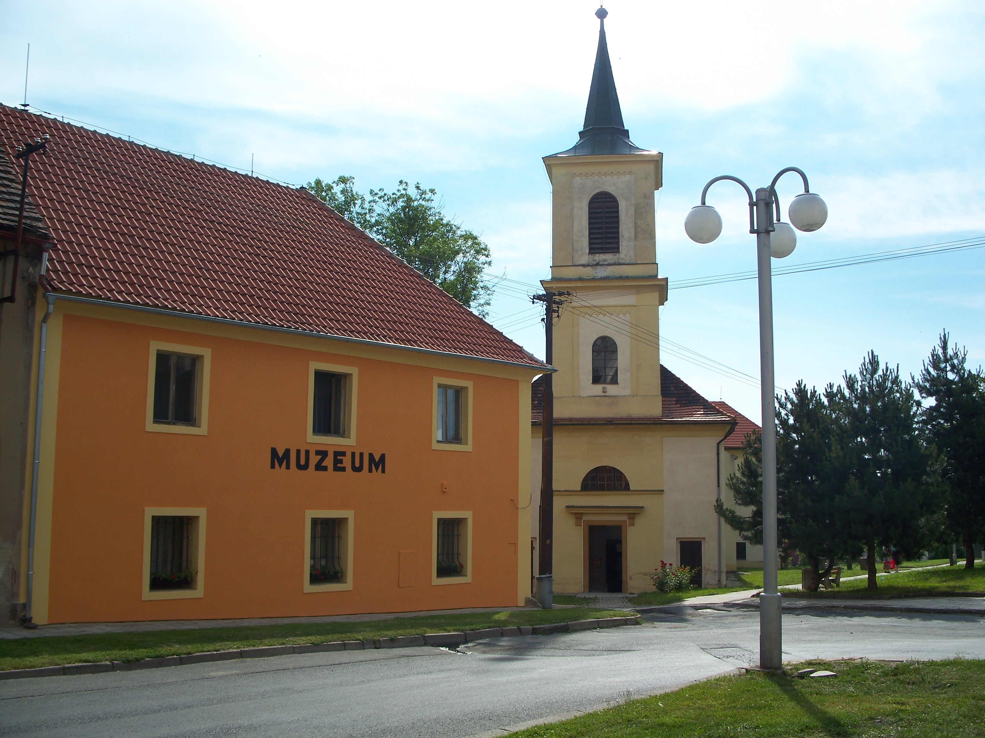 Budova Muzea Nové Strašecí